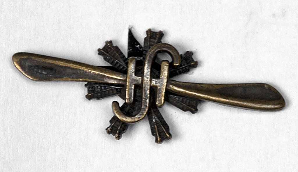 original badge